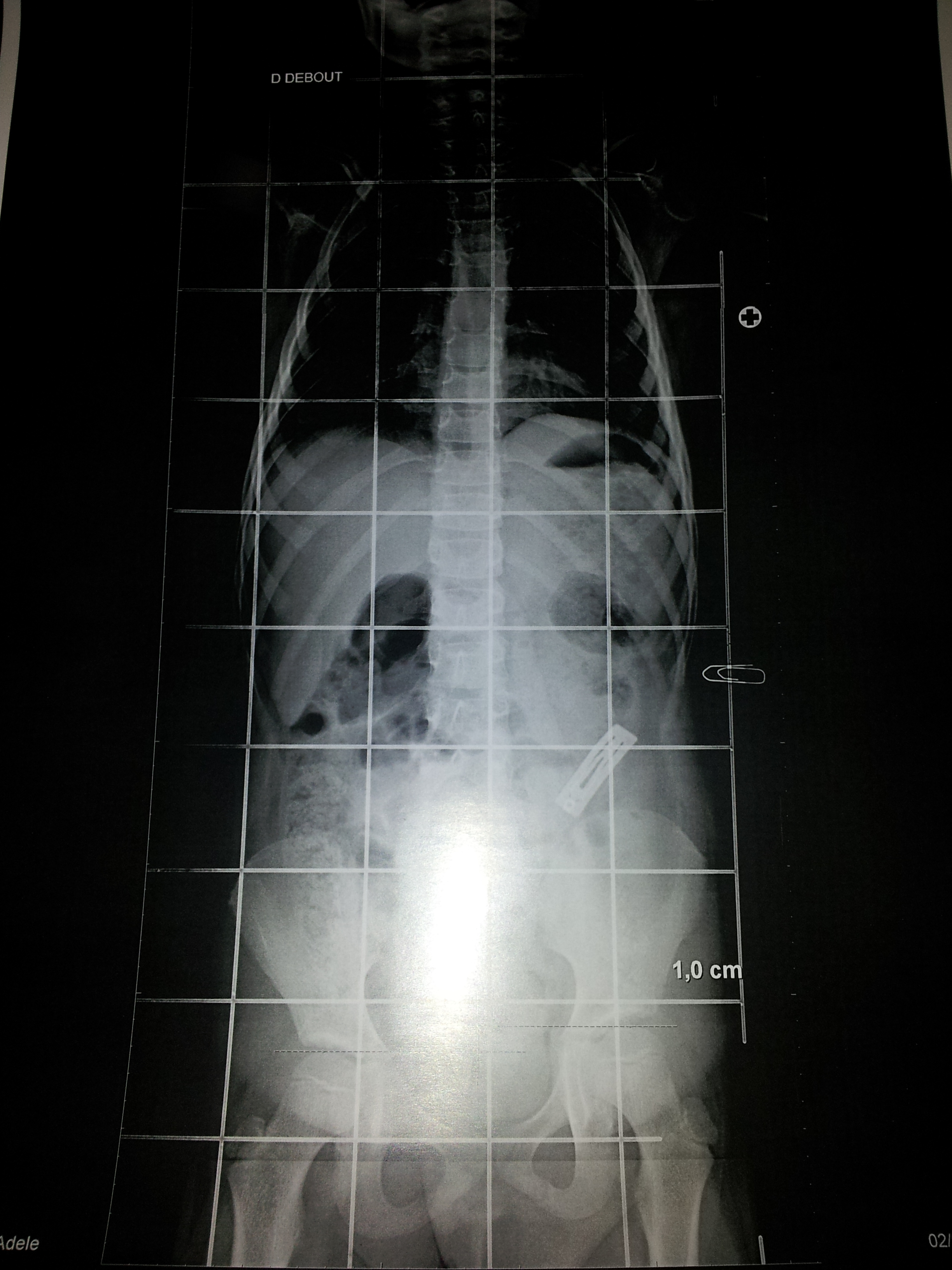 radio fille de 9 ans avec une jambe plus courte de 1cm, et un corps etranger dans l'intestin